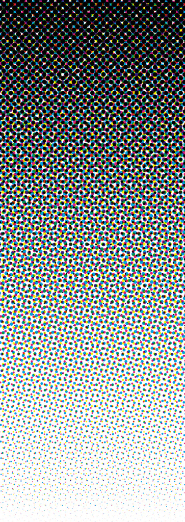 vierfarbiger Zusammendruck von Schwarz, Gelb, Cyan und Magenta